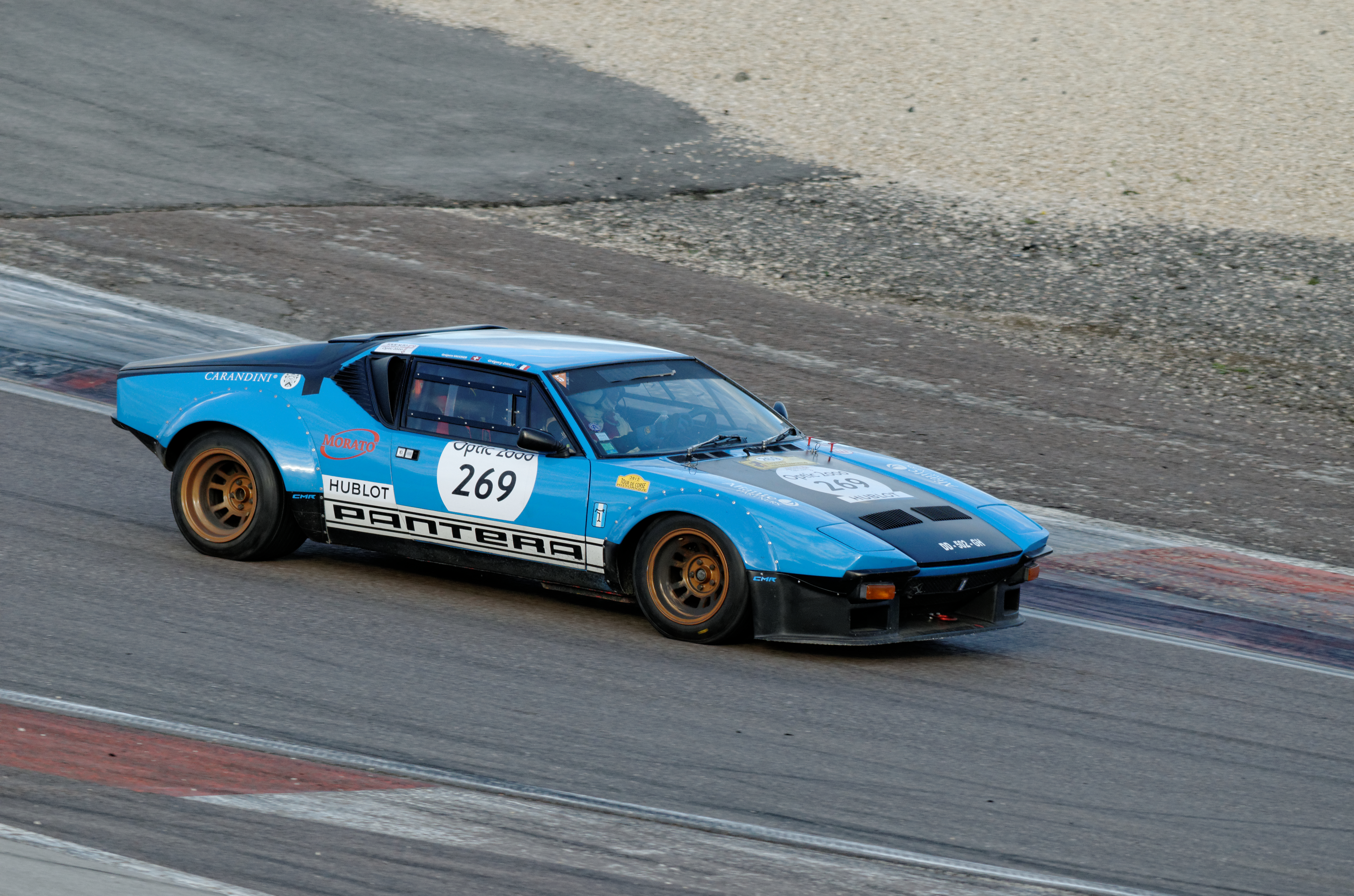 De Tomaso Pantera, Tour Auto 2014, étape sur le Circuit de Prenois.